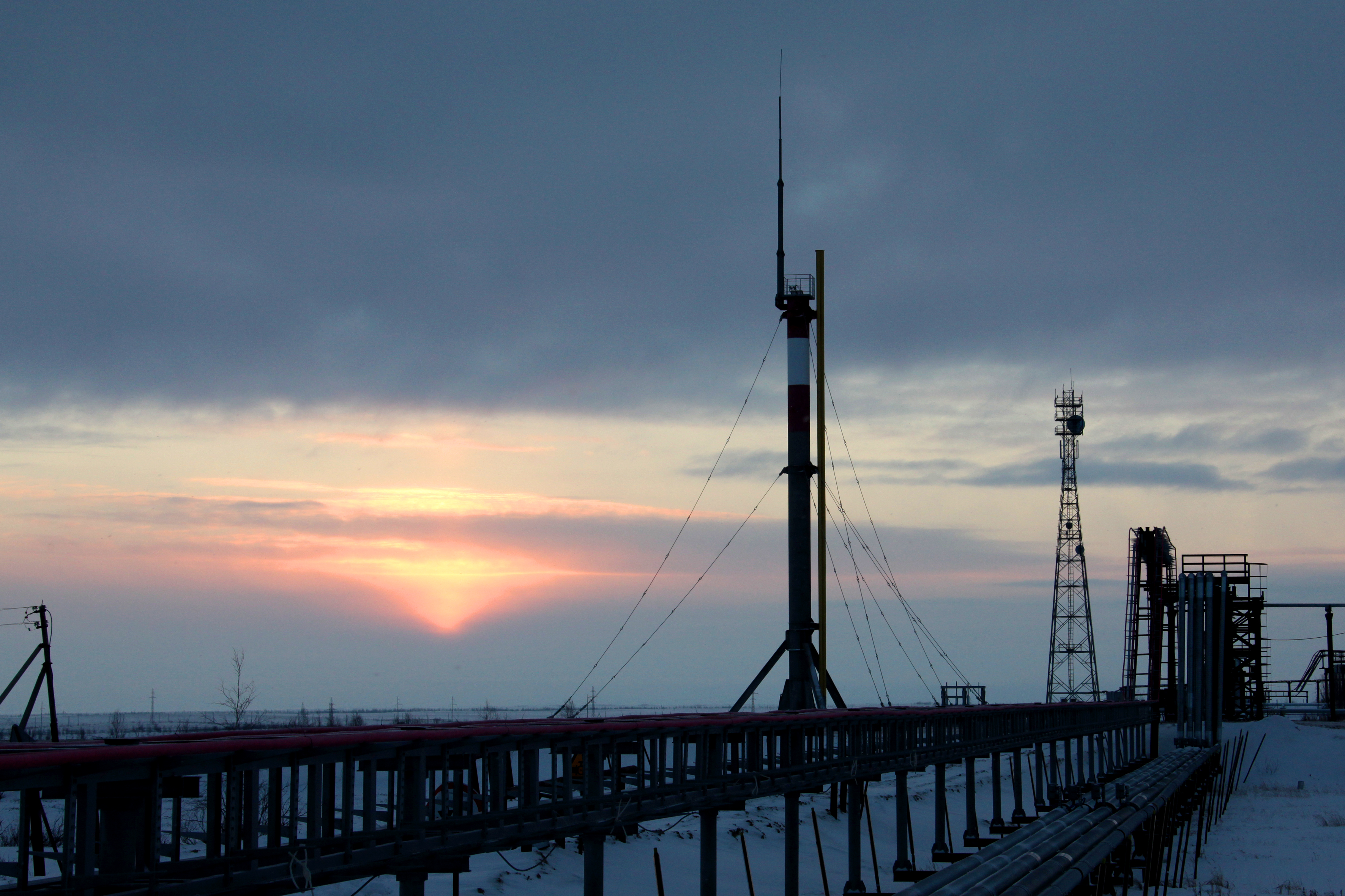 Вид на сооружения УКПГ-Н на Ныдинском участке Медвежьего месторождения. Надымский район, Ямало-Ненецкий автономный округ, Тюменская область. 1 декабря 2011 года